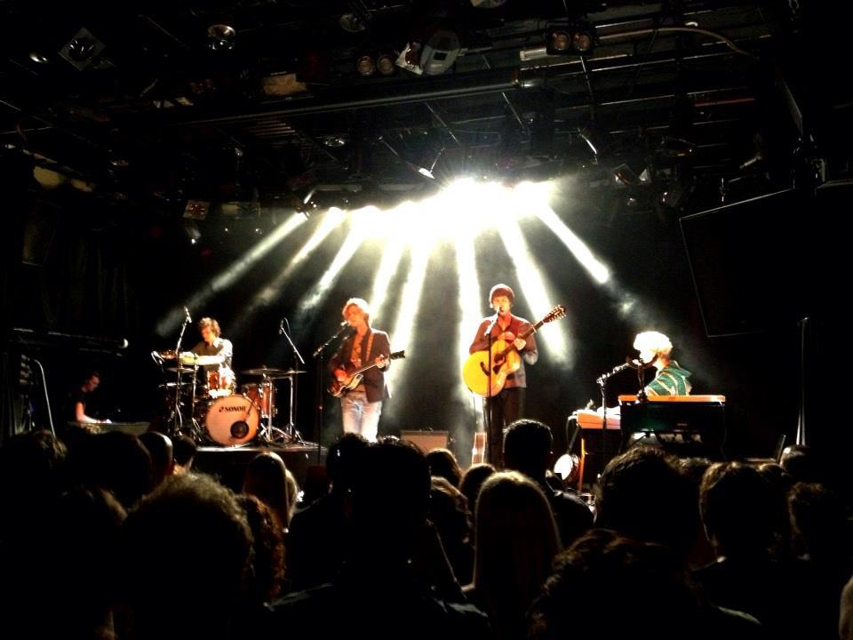 AlascA live bij een optreden in de Melkweg, Amsterdam in 2012